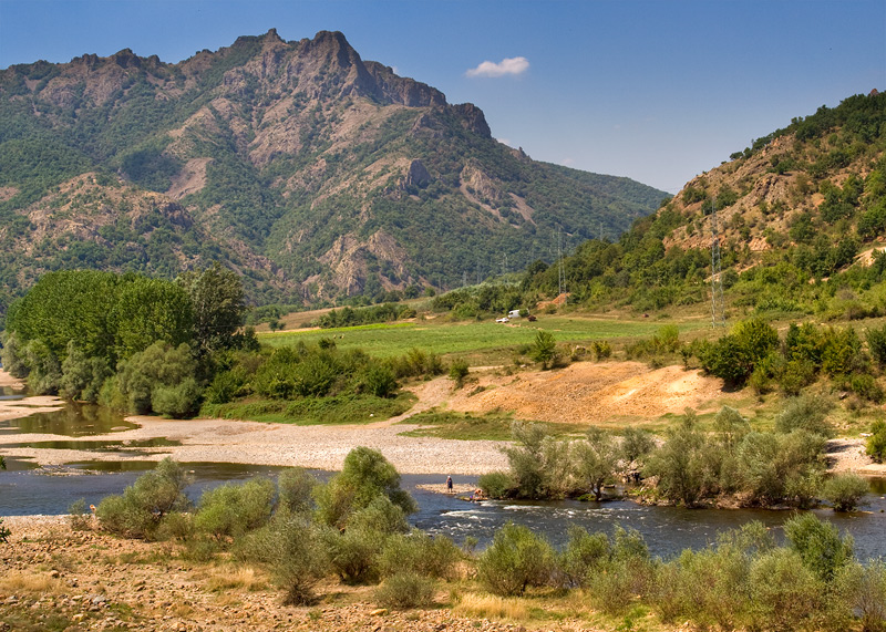 Madzharovo, Haskovo Province, Bulgaria